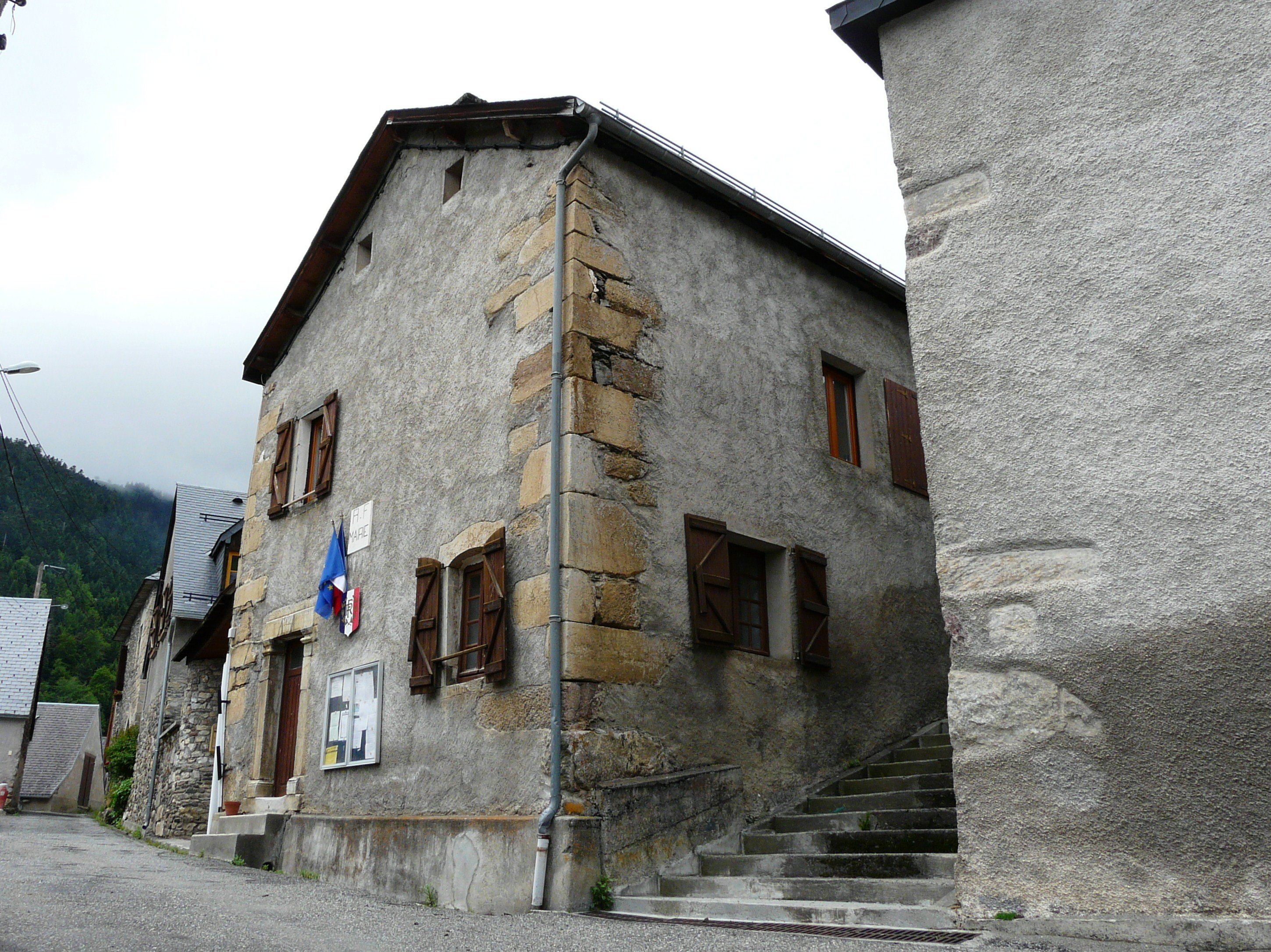 La mairie de Cirès, Haute-Garonne, France.